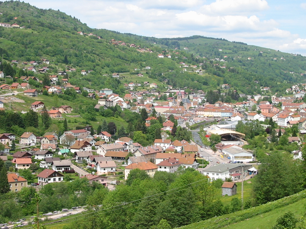 La Bresse : le Centre Commune du département des Vosges. Vue prise de la route du col du Brabant. Photo personnelle du 7 juin 2006. Copyright © Christian Amet